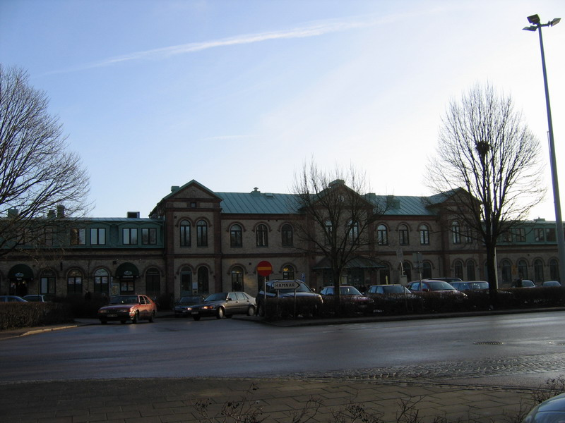 Halmstad station,Sweden